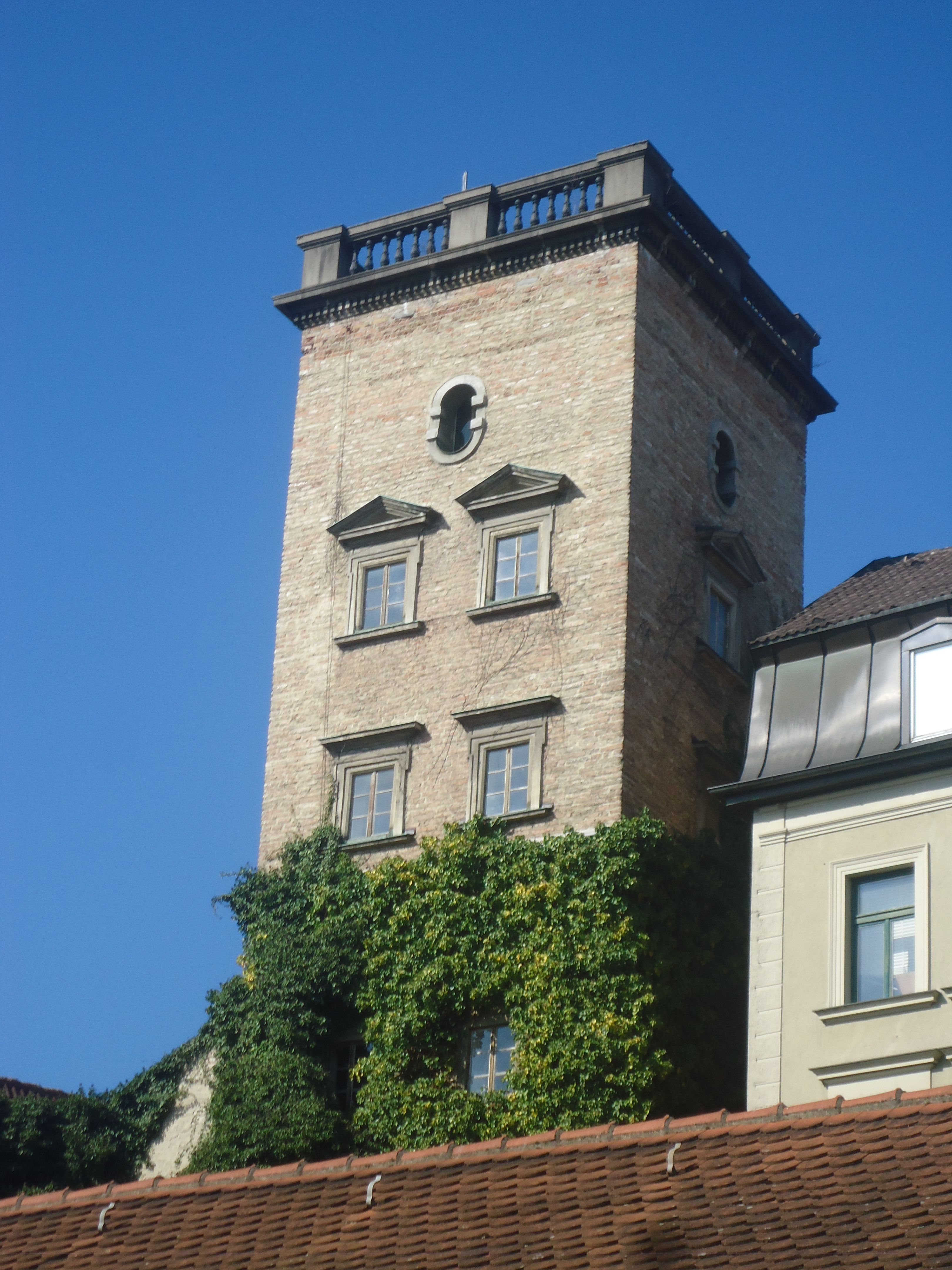 Unterer Brunnenturm beim Liliom